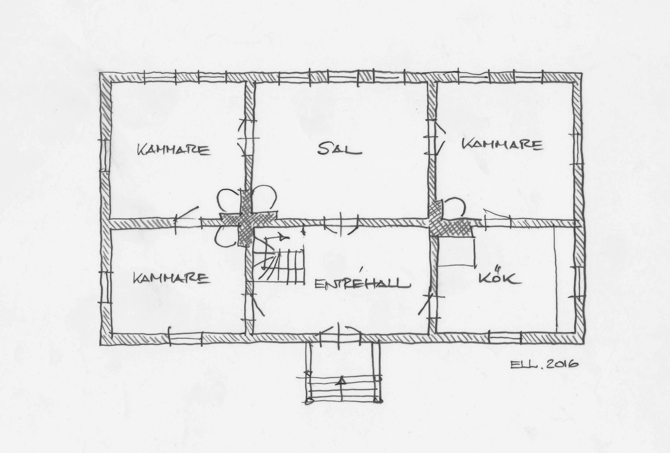 Ritning på en Sexdelad plan eller Salsbyggnad